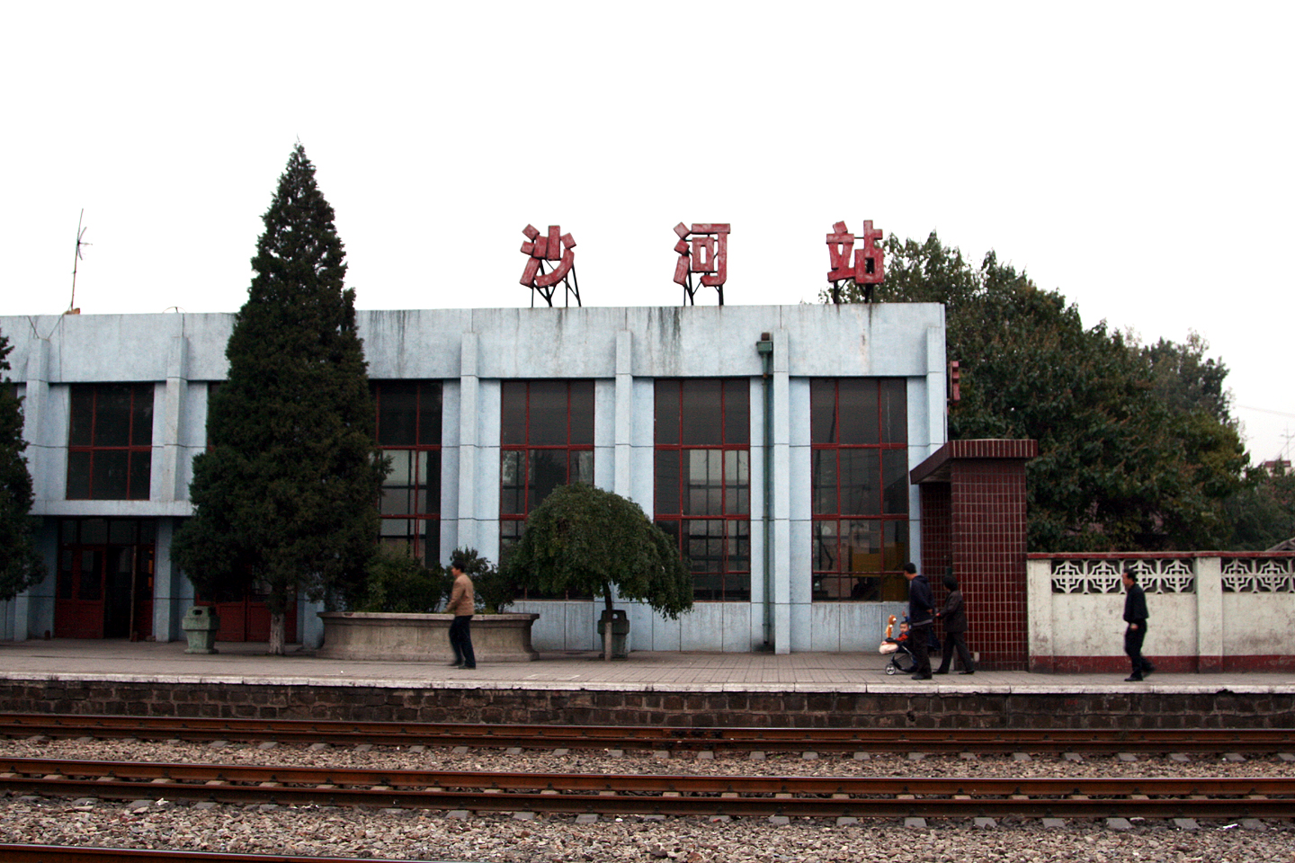 京包铁路沙河站